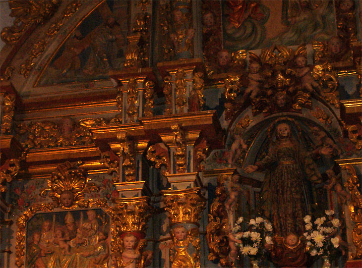 Retablo de 1777 de la Iglesia de Grisuela del Páramo (provincia de León, España), monumento declarado de Bien de Interés Cultural en 1975.